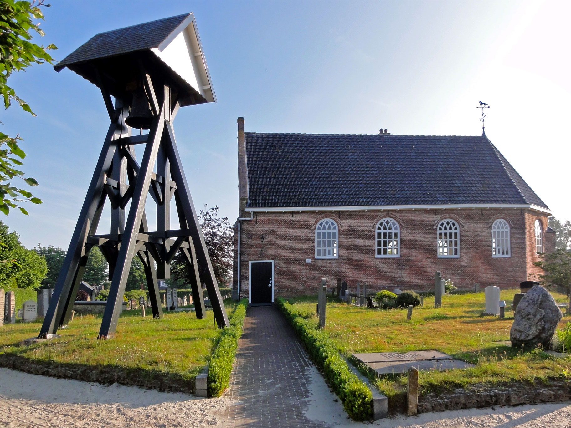 De kerk van Boijl met klokkenstoel